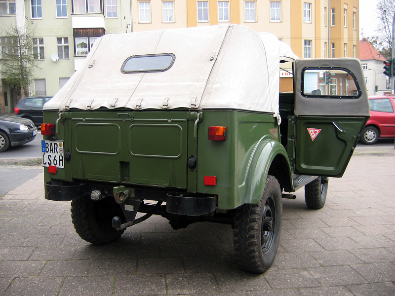 GAZ-69A